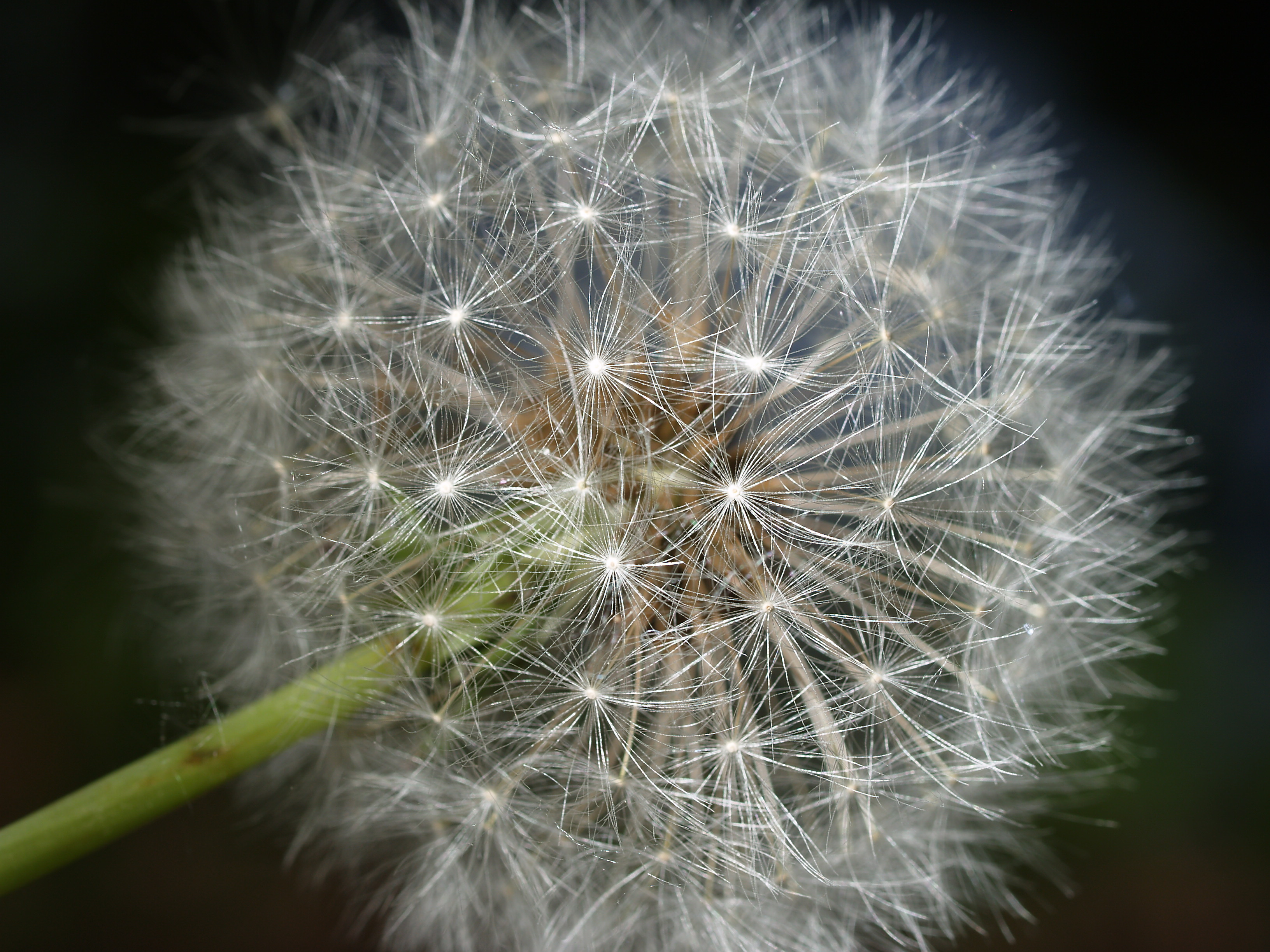 Taraxacum, seeds detail 1.jpg